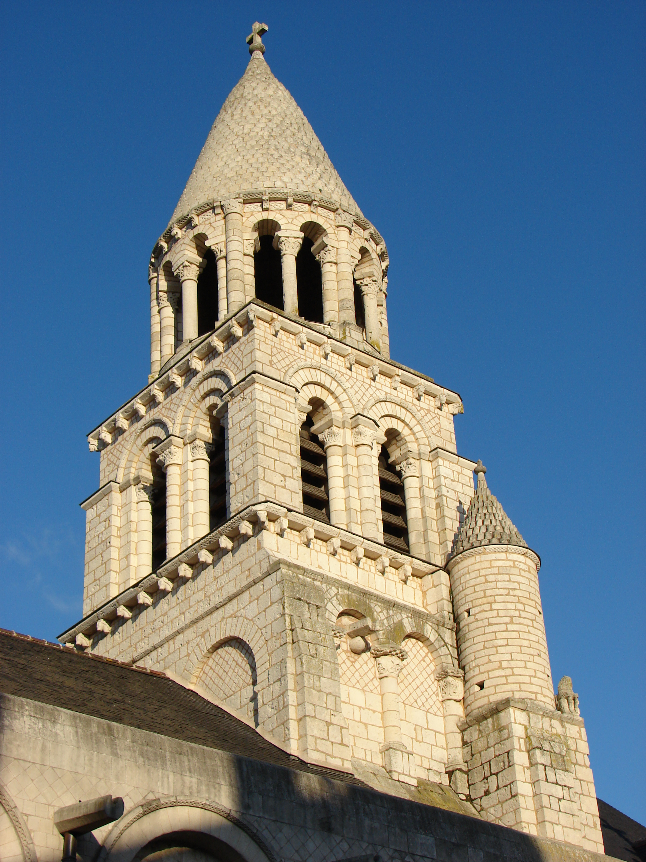 Clocher de l'église Notre-Dame la Grande de Poitiers